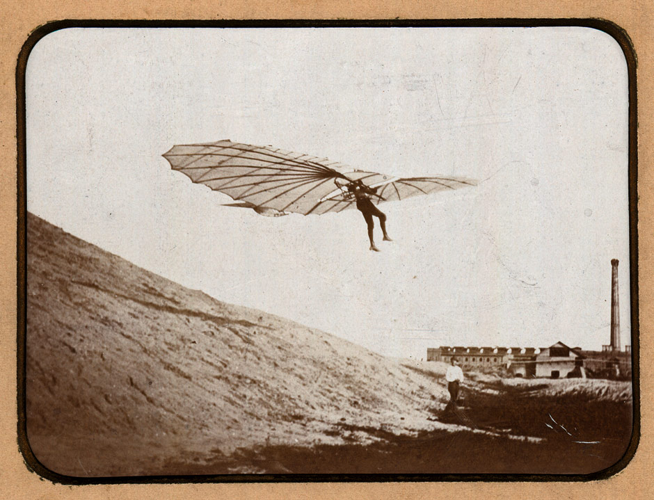 Otto Lilienthals Flug vom 29. Mai 1895 am Fliegeberg Aufgen. am 29 Mai 1895 Abends 6 ¼ Uhr von Dr. R. Neuhauss